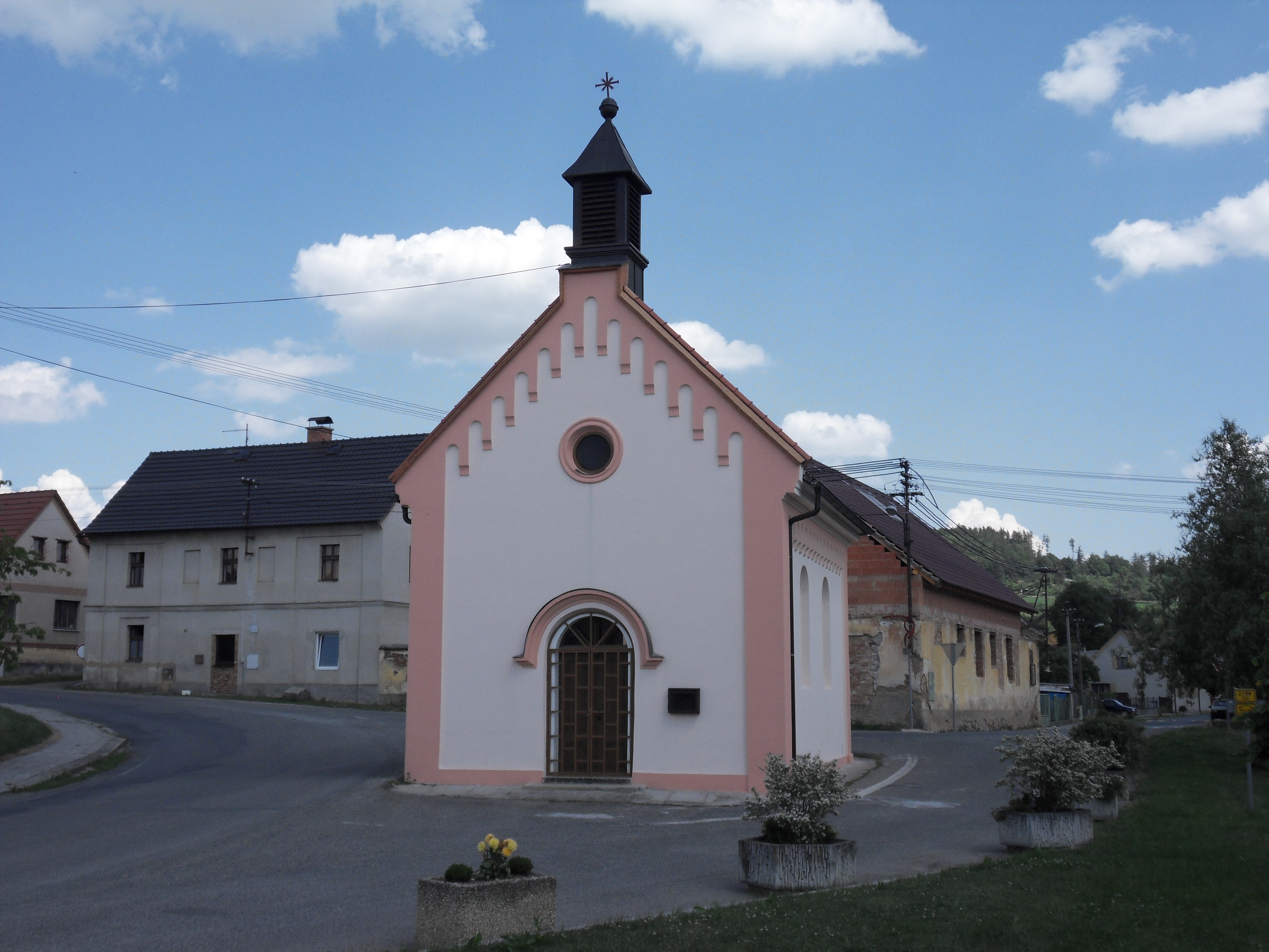 Kaple sv. Jana Nepomuckého, Příchovice, okr.Plzeň-jih